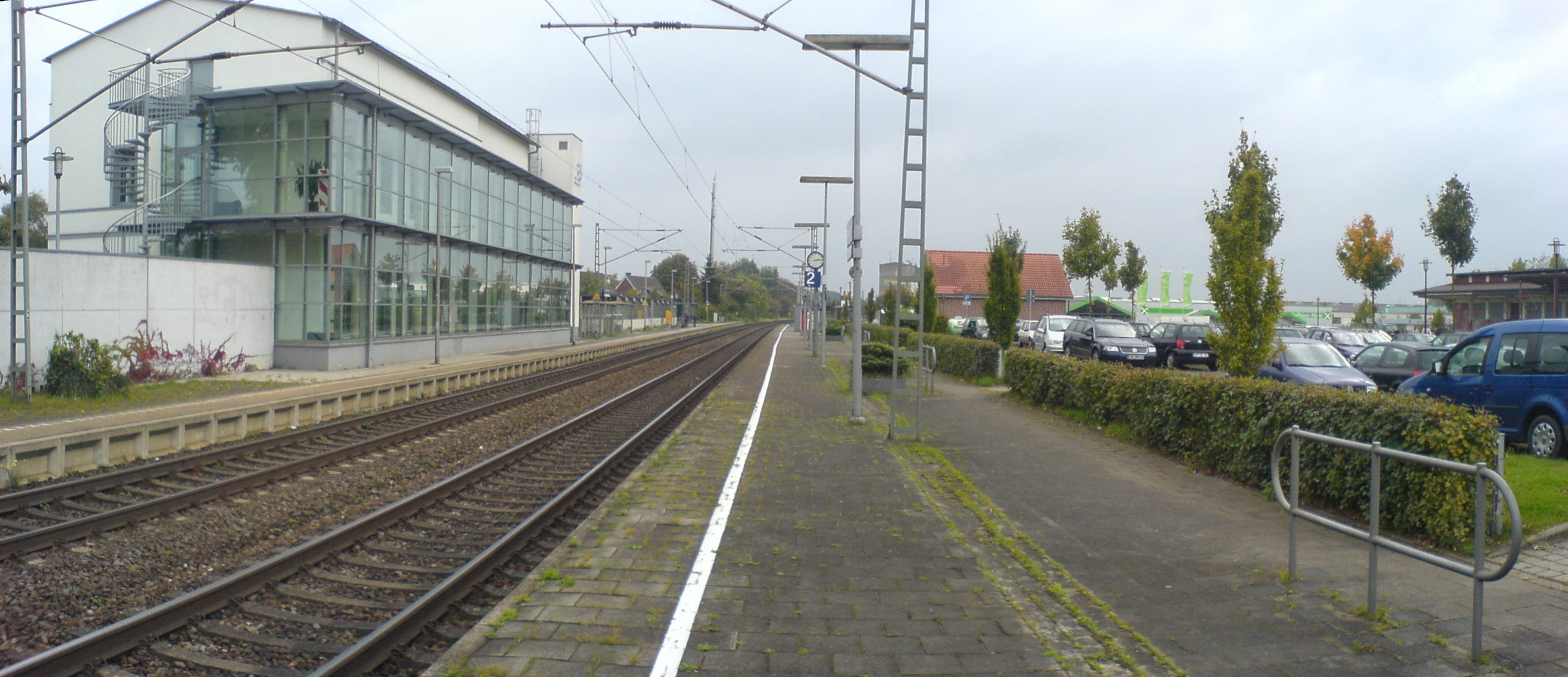 Bahnhof Drensteinfurt